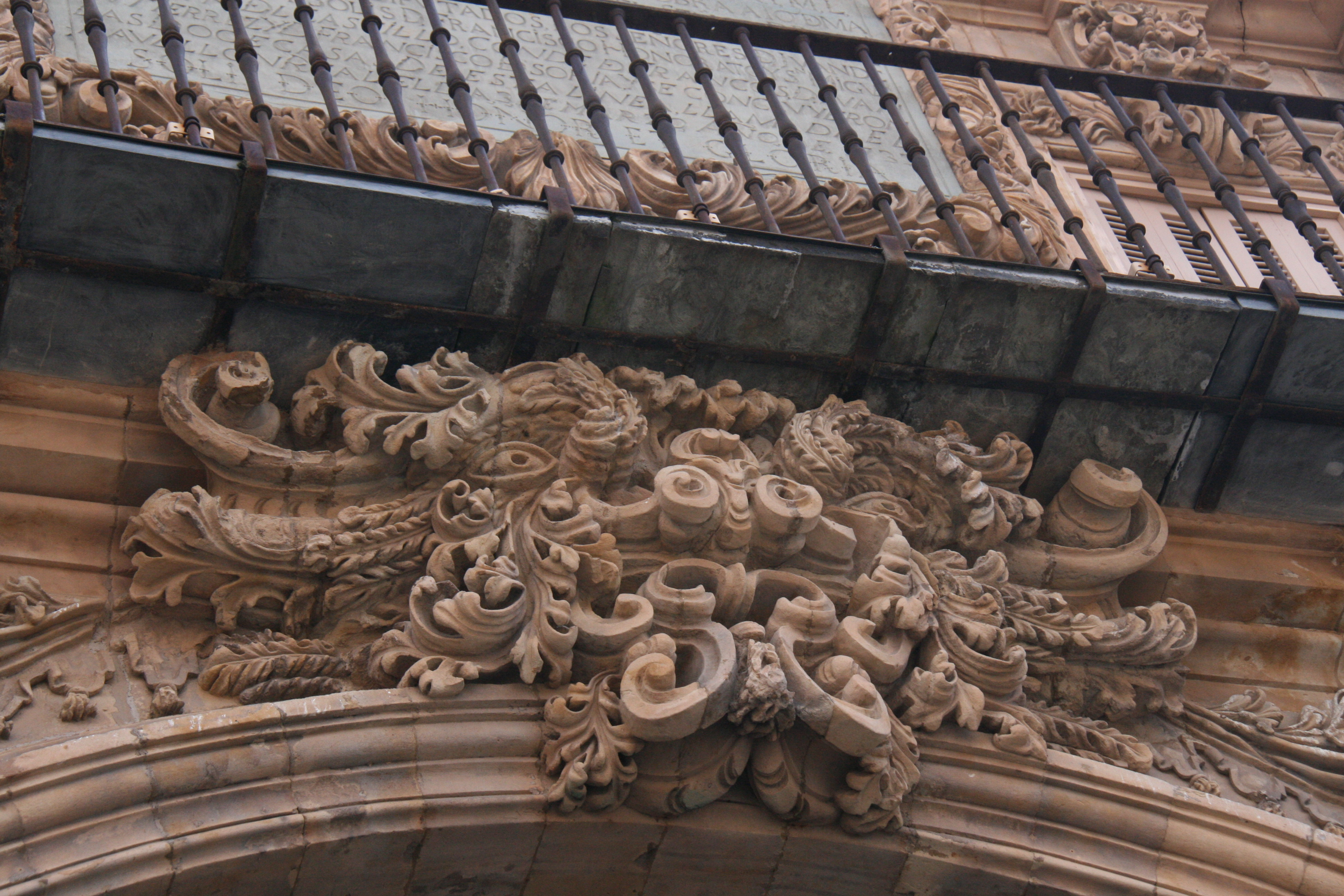 Hojarasca en la dovela superior del Arco de San Fernando (Pablellón Real) de la Plaza Mayor de Salamanca